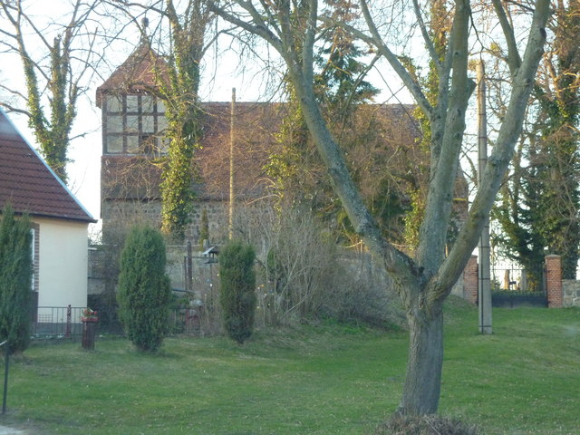 Kirche in Berkholz. LK Uckermark., 15 km from Prenzlau, Deutschland (Zone 33).